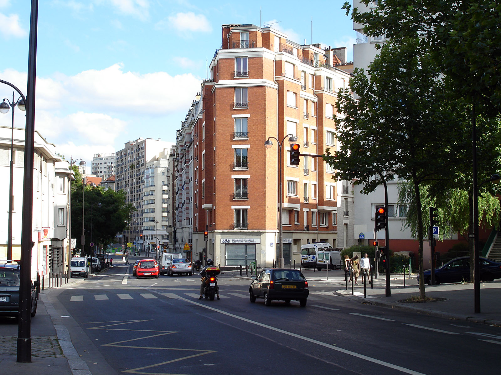 Le boulevard Sérurier, dans le 19e arrondissement de Paris. Au-dessous de ce tronçon, se situe la station de métro « fantôme » Haxo.